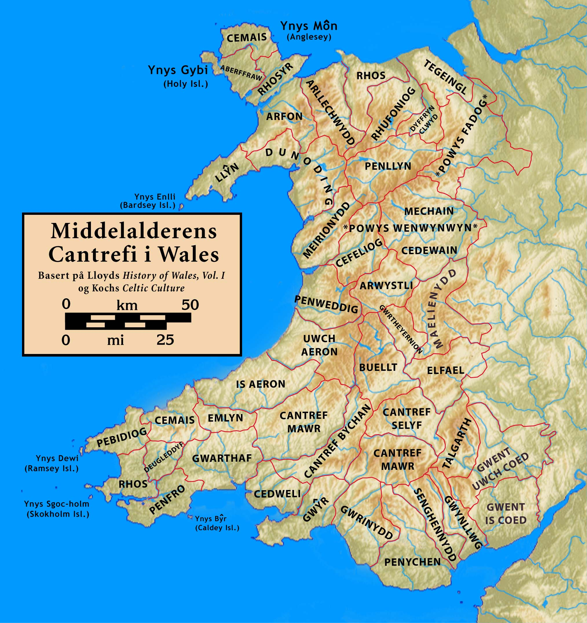 Middelalderens Cantrefi i Wales